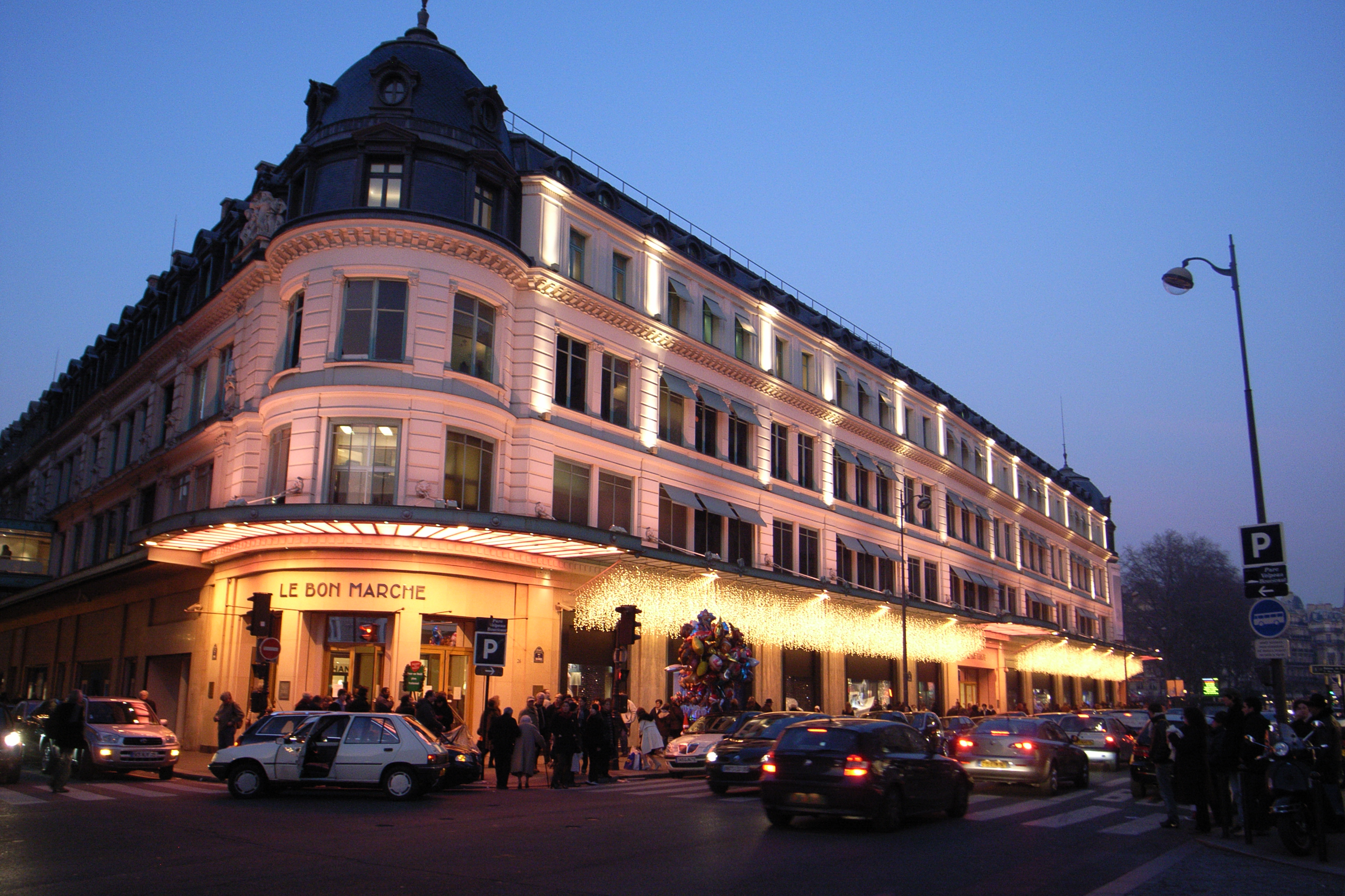 Department store Le Bon Marche Paris France